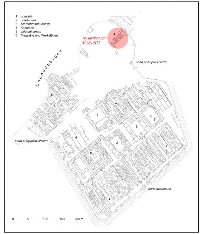 Legionslager Carnuntum: Übersichtsplan (aus Becker, G. & Harl, O. 1983. Archäologie in Österreich) 1. Principia, 2. Praetorium, 3. Tribunenhäuser, 4. Kasernen, 5. Lazarett, 6. Werkstätten und Speicherbauten.